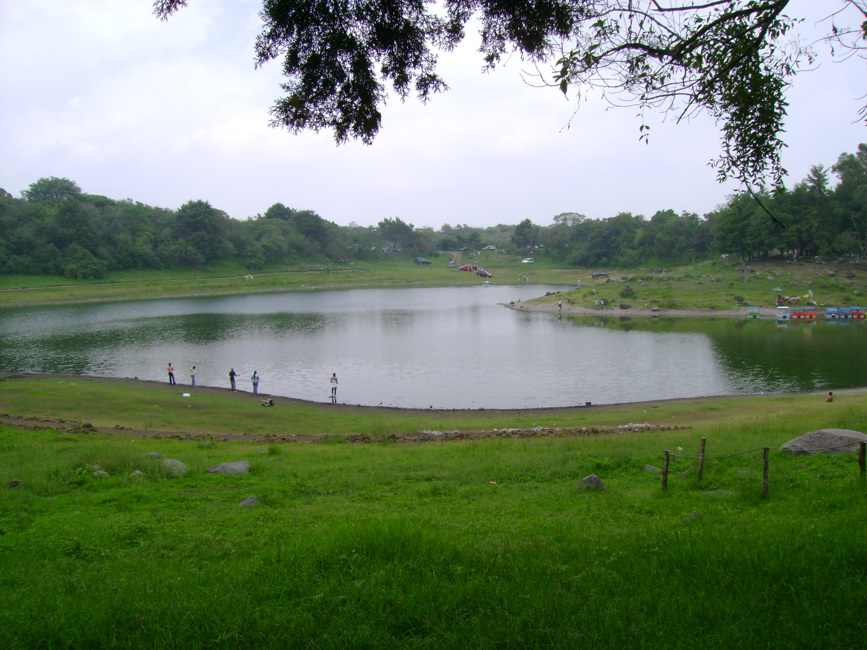 Panorámica de la Laguna de Carrizalillo, en Comala, Colima